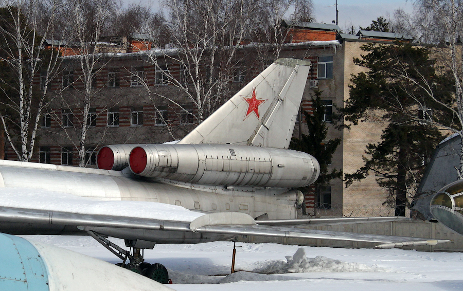 Central Air Force Museum 2011